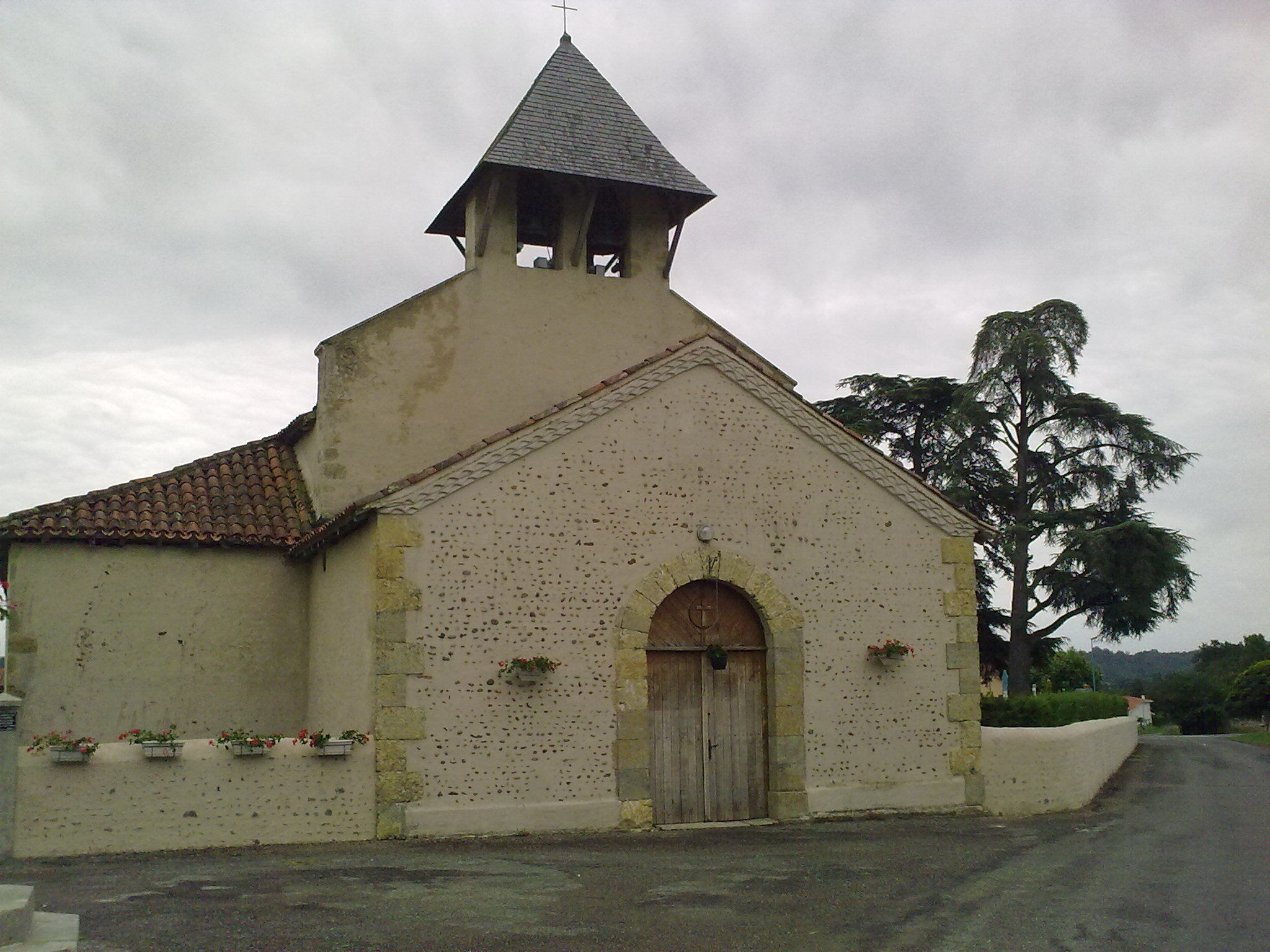 Ségos